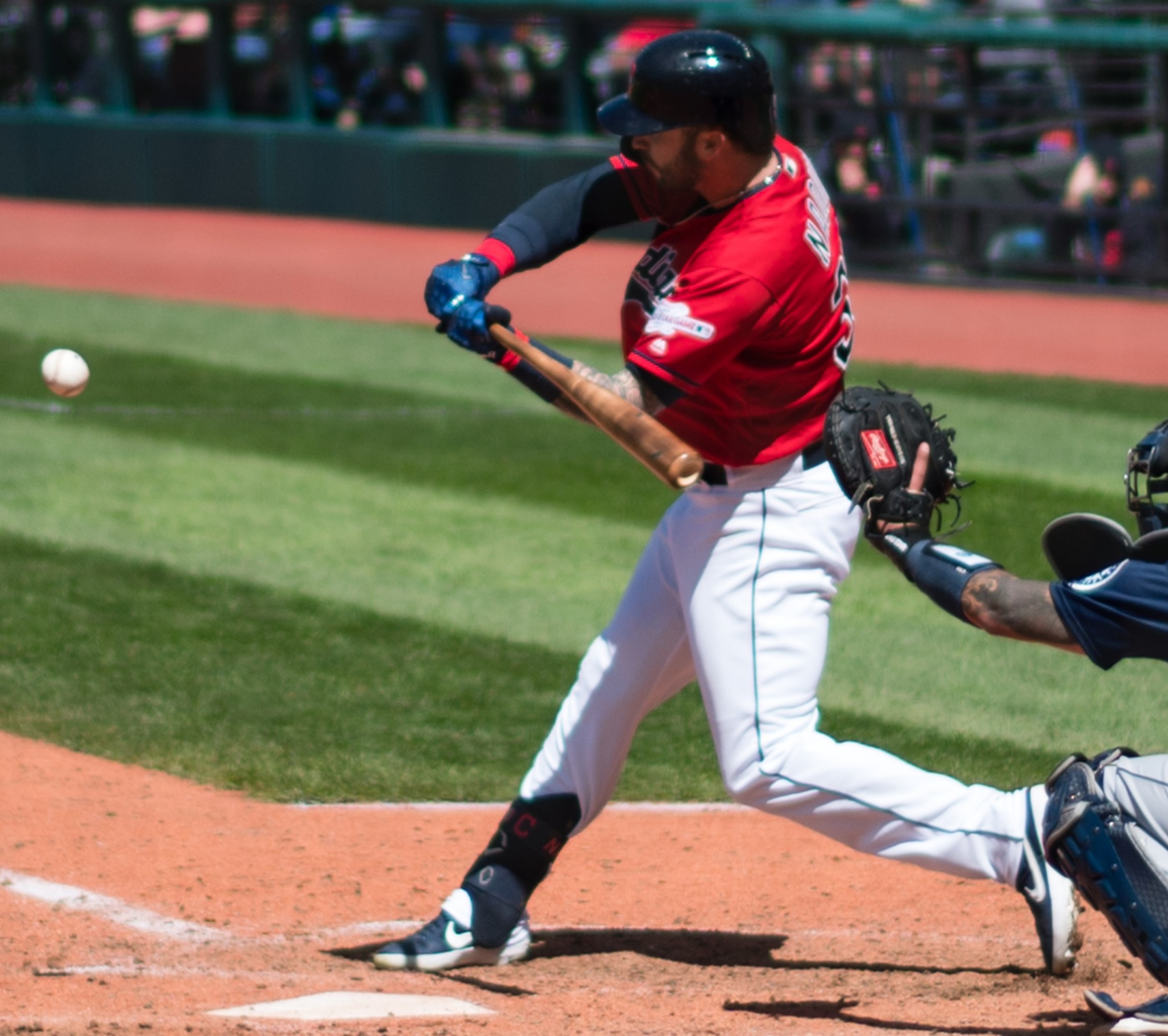 Seattle Mariners VS. Cleveland Indians